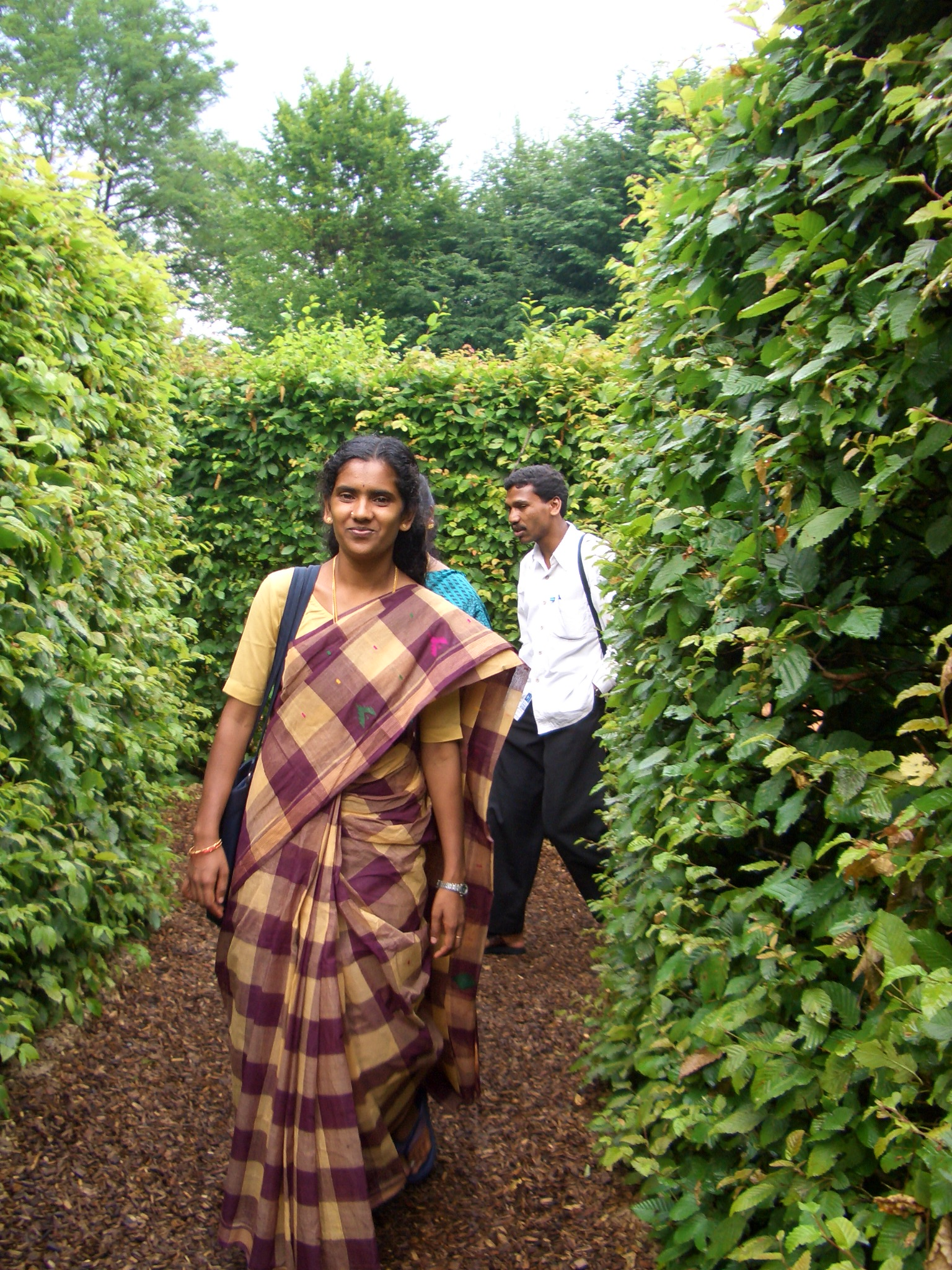 Adivasi bei einem Besuch in Deutschland